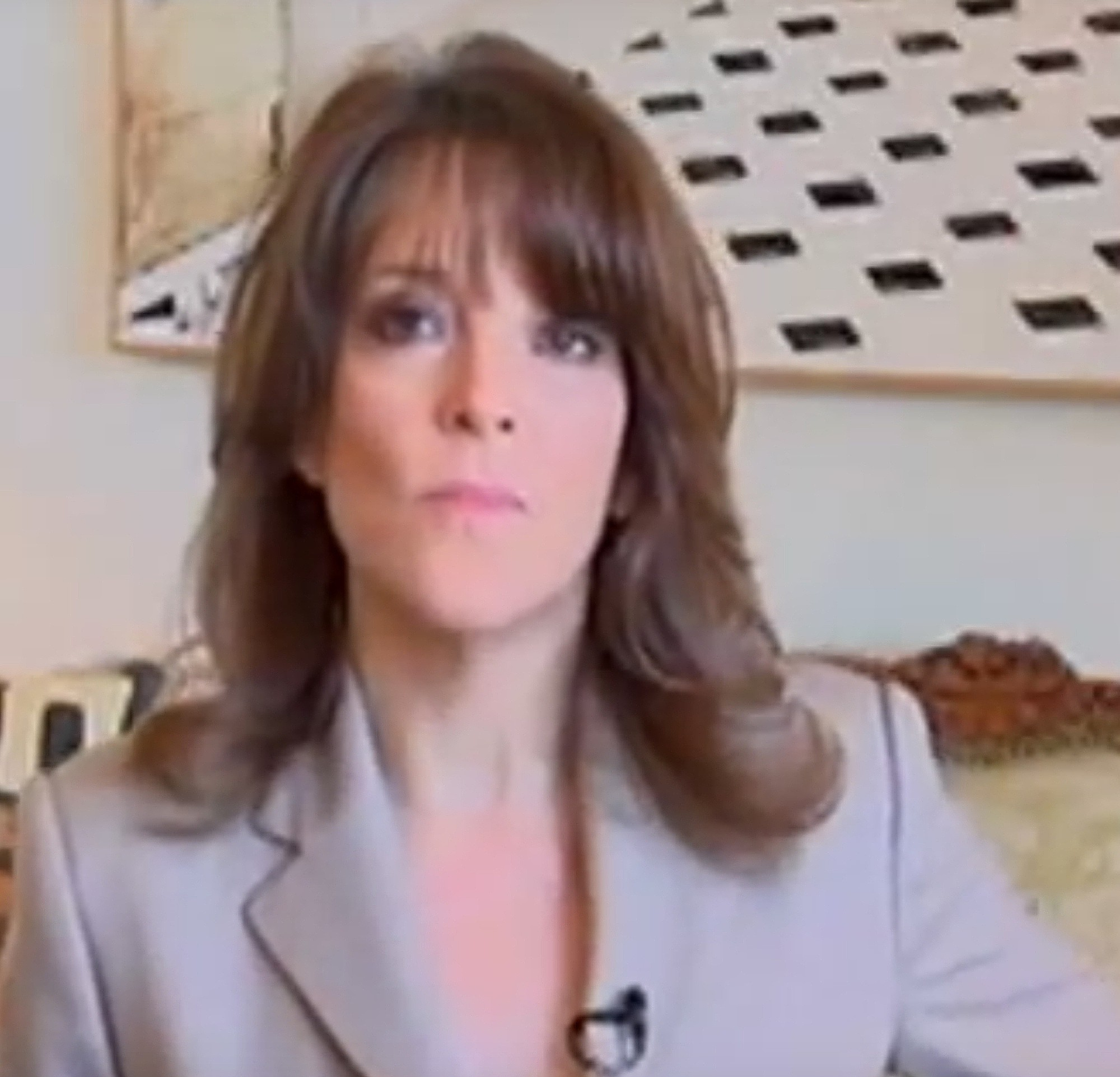 Marianne Williamson for Peace Day 2011